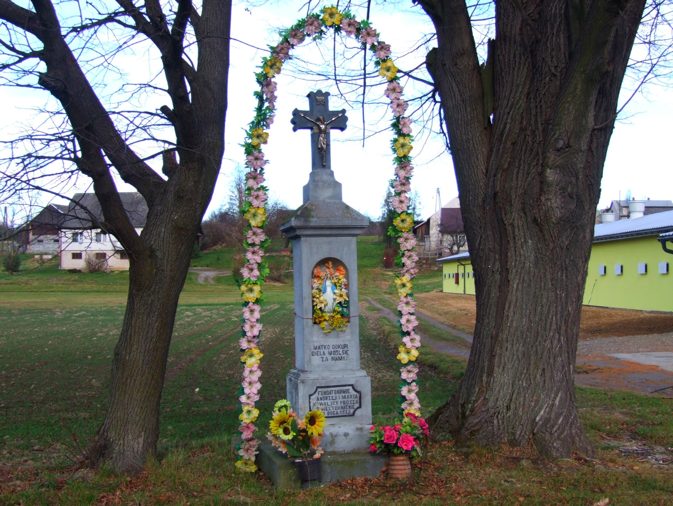 Łąkta Dolna. Figurka przy głównej drodze